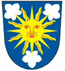 Znak obce Loukov